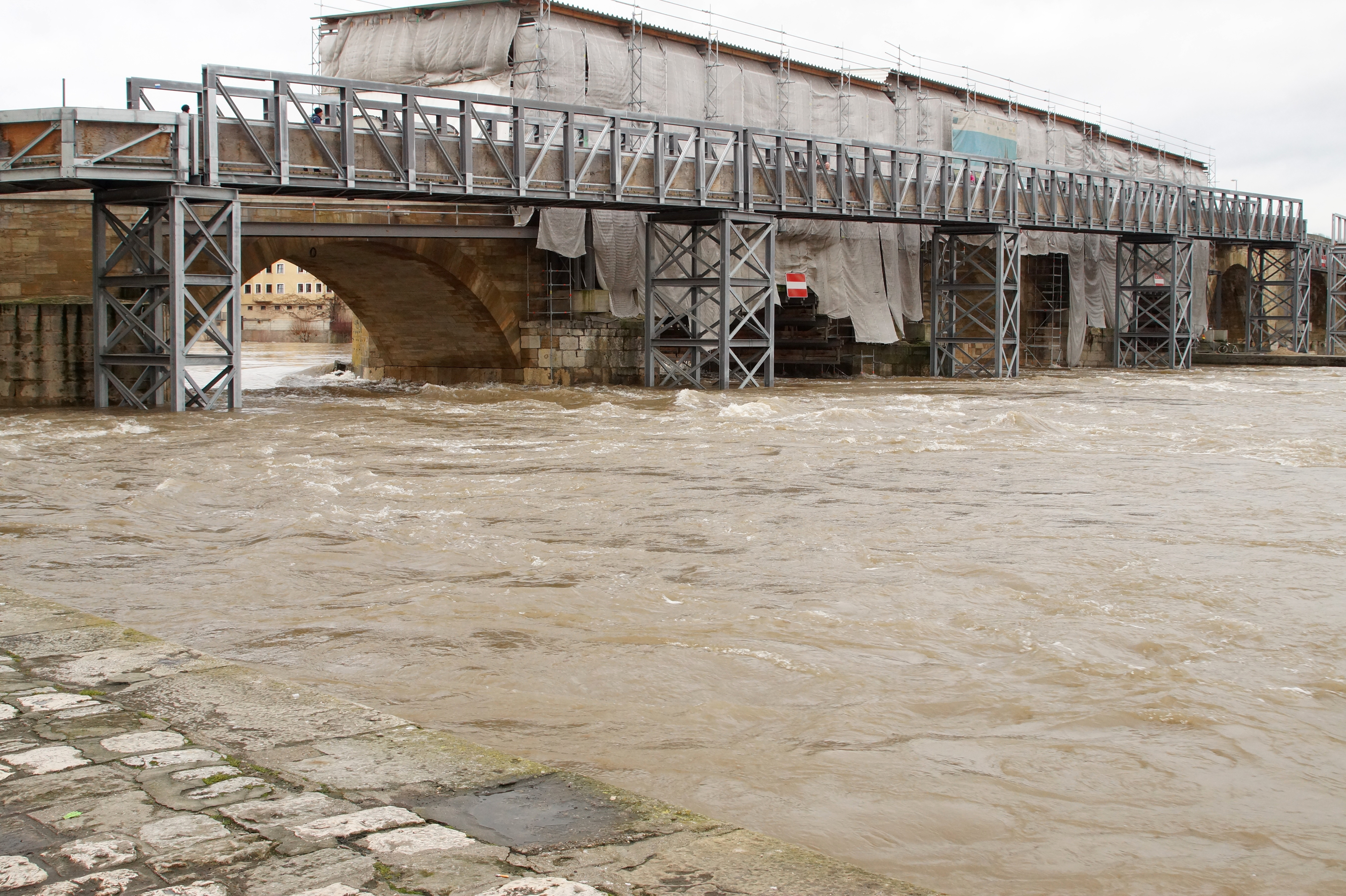 Regensburg, Steinerne Brücke als Baustelle während der Sanierung